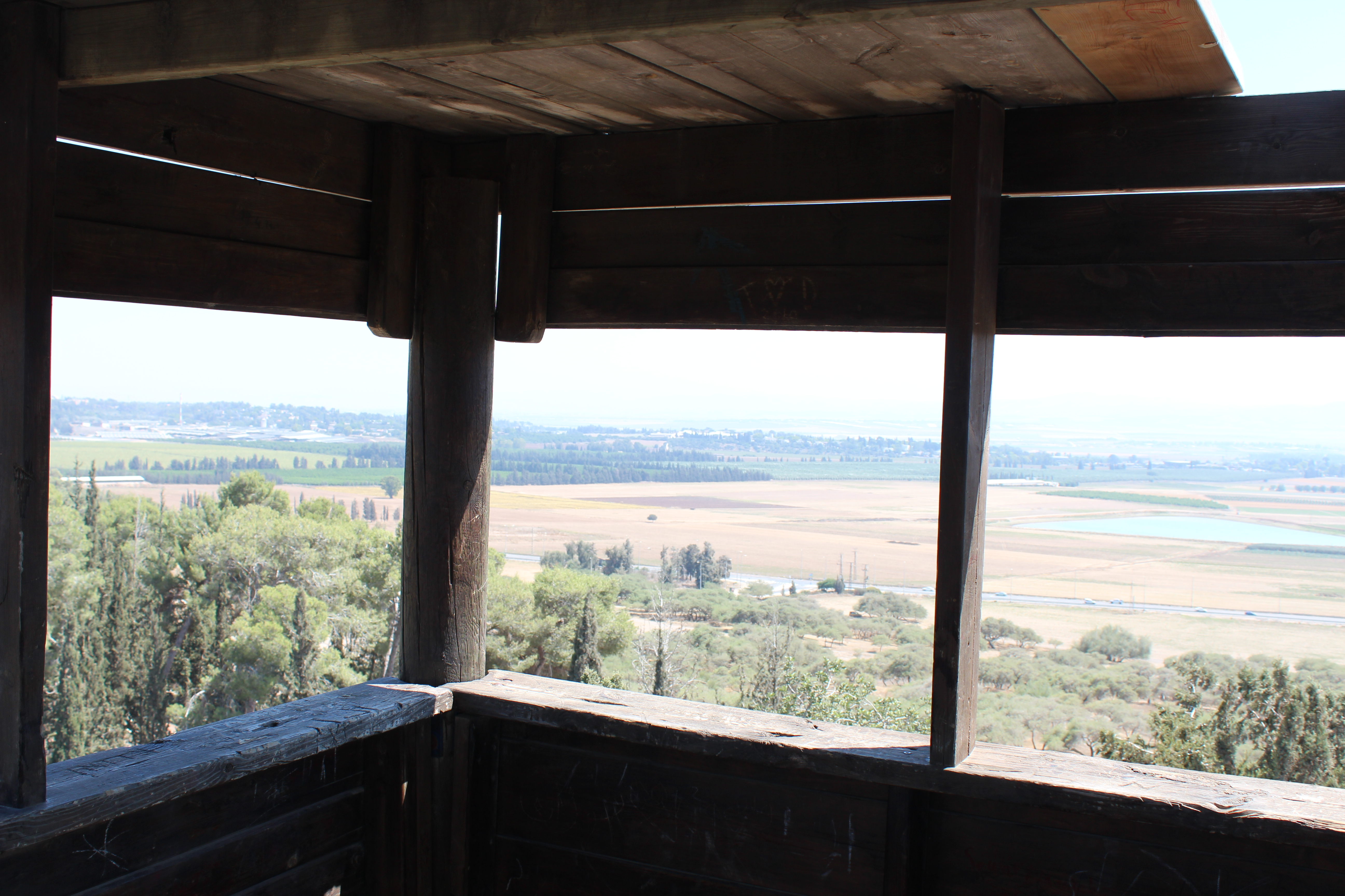 אחת הערים החשובות בצפון ארץ ישראל בעת העתיקה. היא נזכרת בתנ"ך בשם זה, ובתעודות מחוץ למקרא בשם שמע'ון. היא זוהתה בתל הקרוי בערבית "תל סַמוּנִיֶה", מתנשא כ-60 מ' מעל סביבתו, הצלע הצפון מזרחית של התל תלולה, והוא משתפל במתינות לכיוון דרום מערב. התל שוכן מצפון-מזרח למושב נהלל, בגבול עמק יזרעאל והגליל התחתון, ליד כביש הכניסה לתמרת.